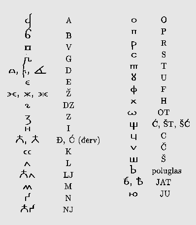 Tabla bosančice